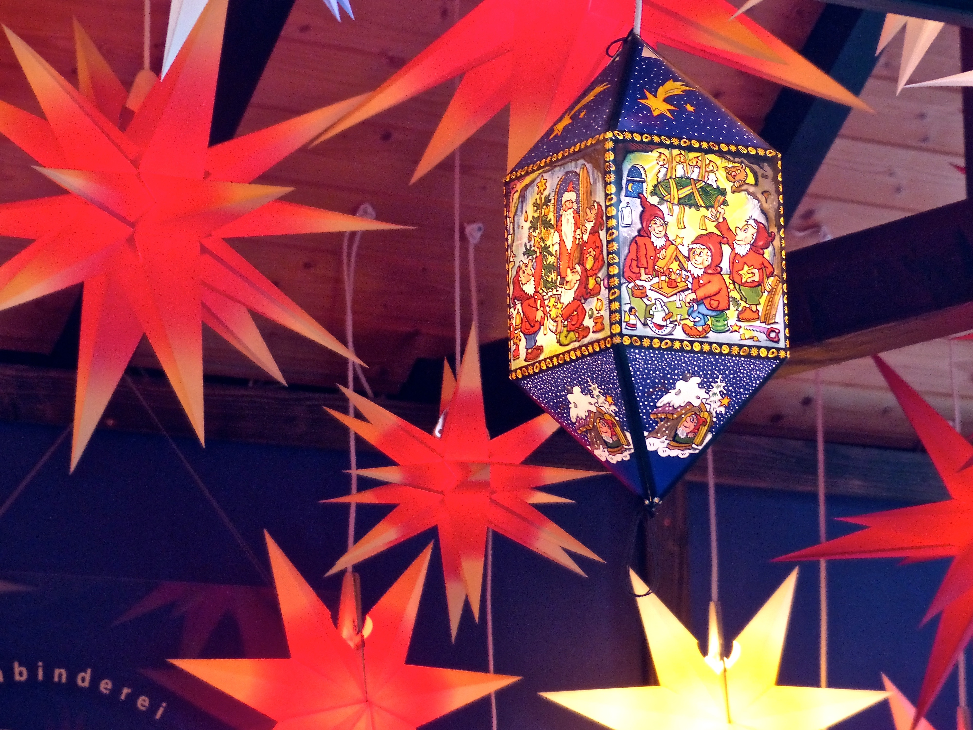 Annaberger Faltsterne und eine Metten (Weihnachts-)laterne aus Pappe auf dem Weihnachtsmarkt in Annaberg-Buchholz